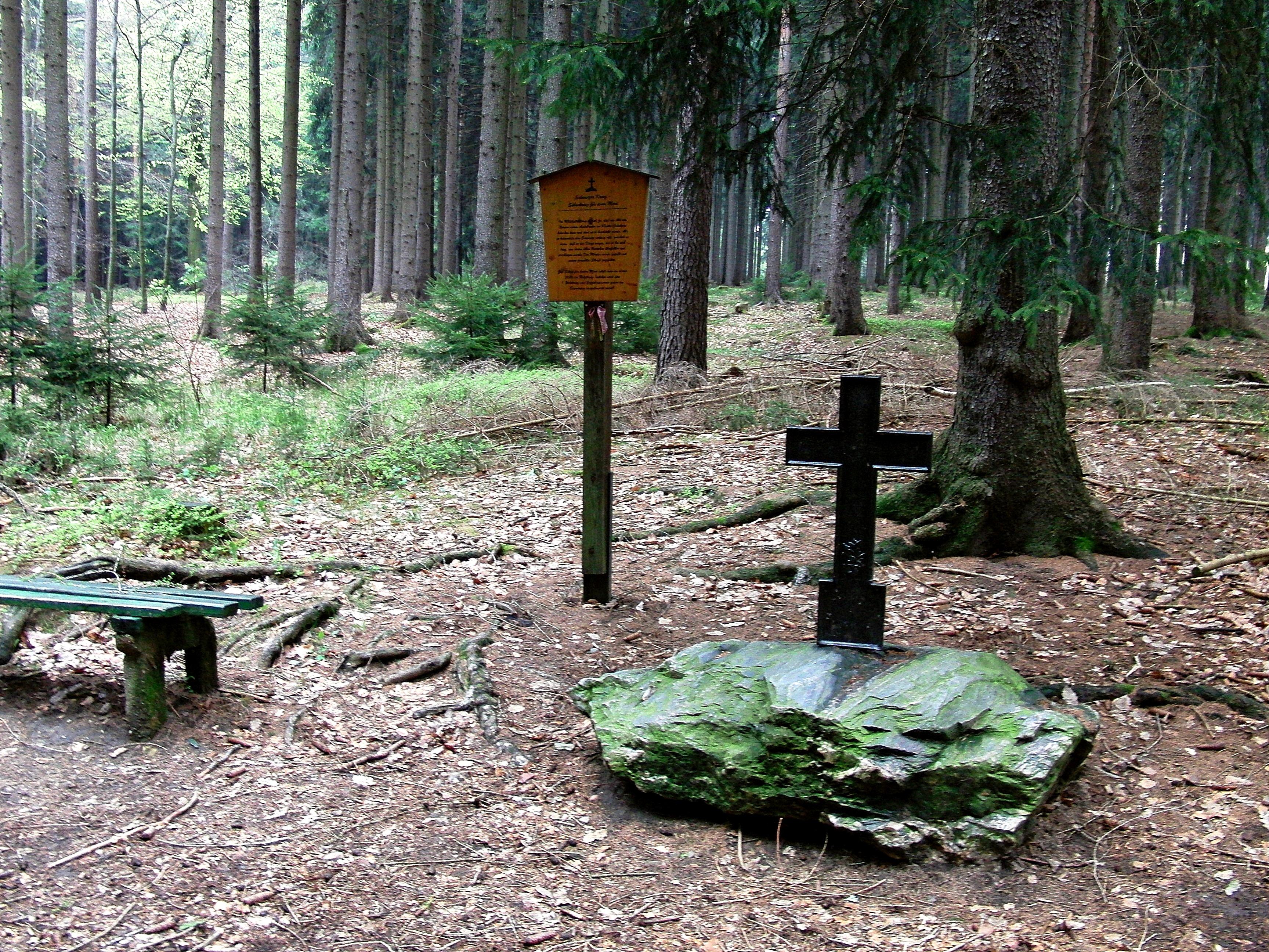 Entlang des Thalheimer Rundweges. Schwarzes Kreuz.